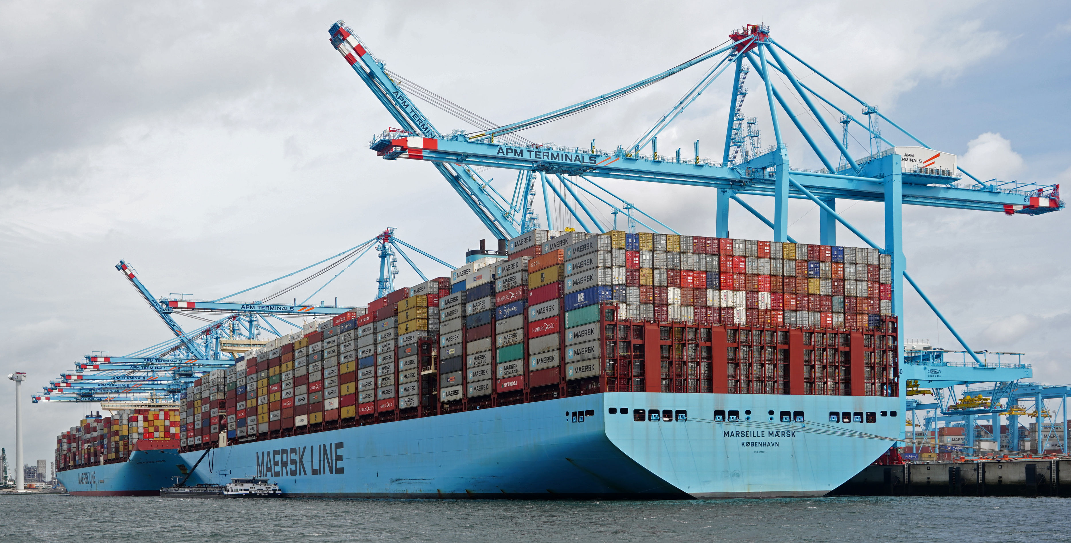 Netwerk dag van Piet Sinke van Maasmond Maritiem aan boord van de ELBE , vanuit Maassluis via de Rozenburgsluis naar de Maasvlakte 2